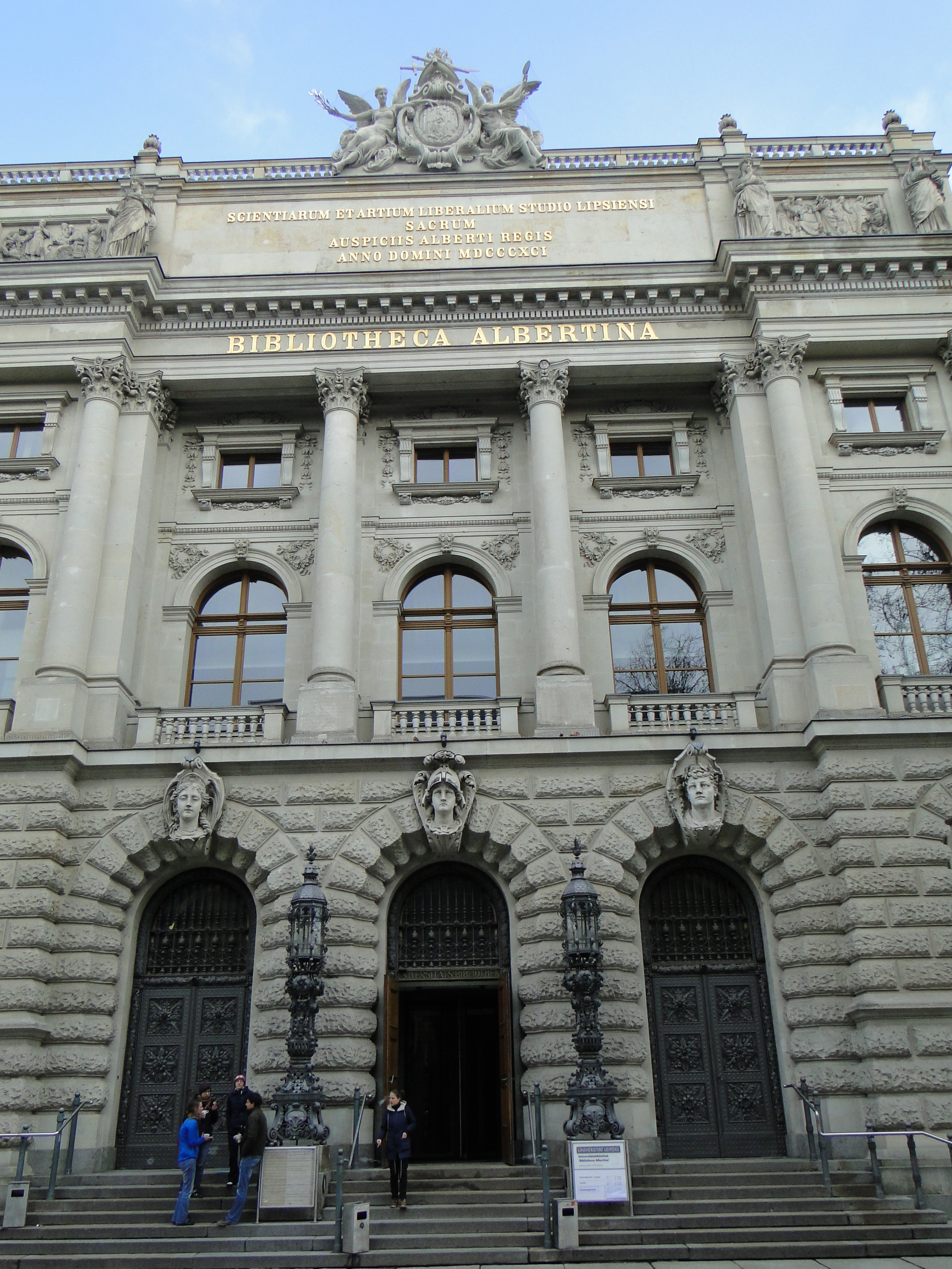 Leipzig, April 2013